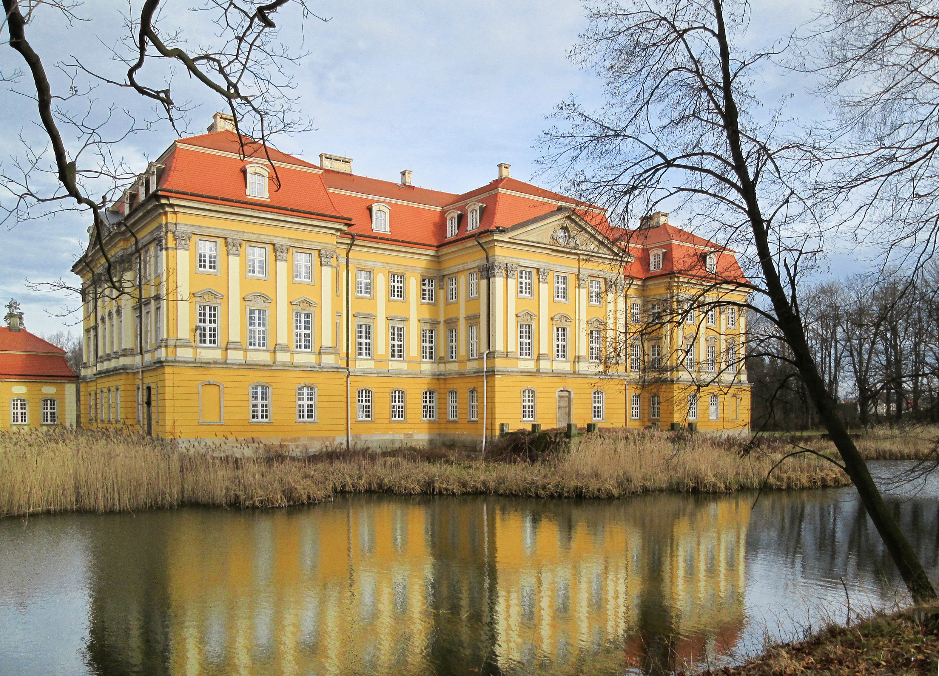 ehem. Stift Joachimstein in Radomierzyce (Radmeritz)